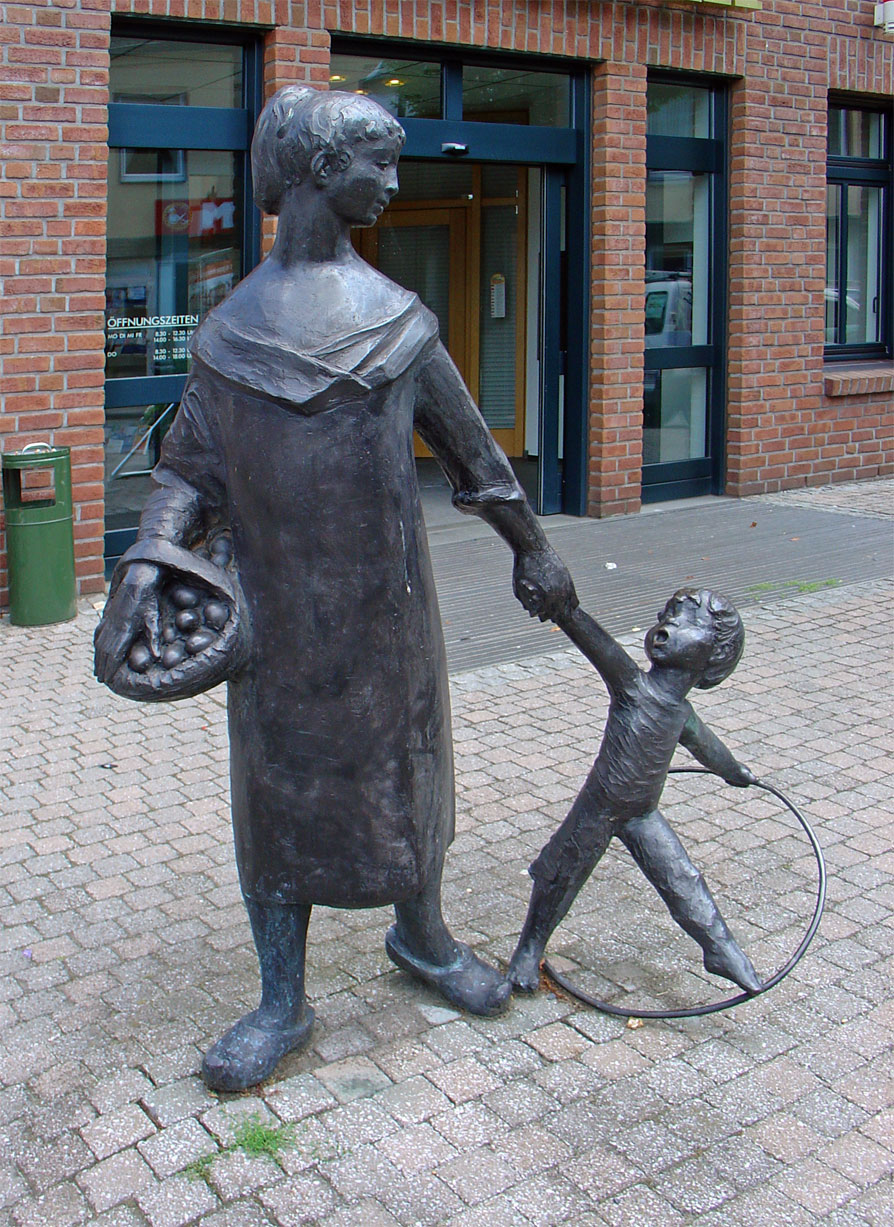 Vrouw met korf eieren en kind met hoepel - Eiermarkt Anholt (Isselburg)